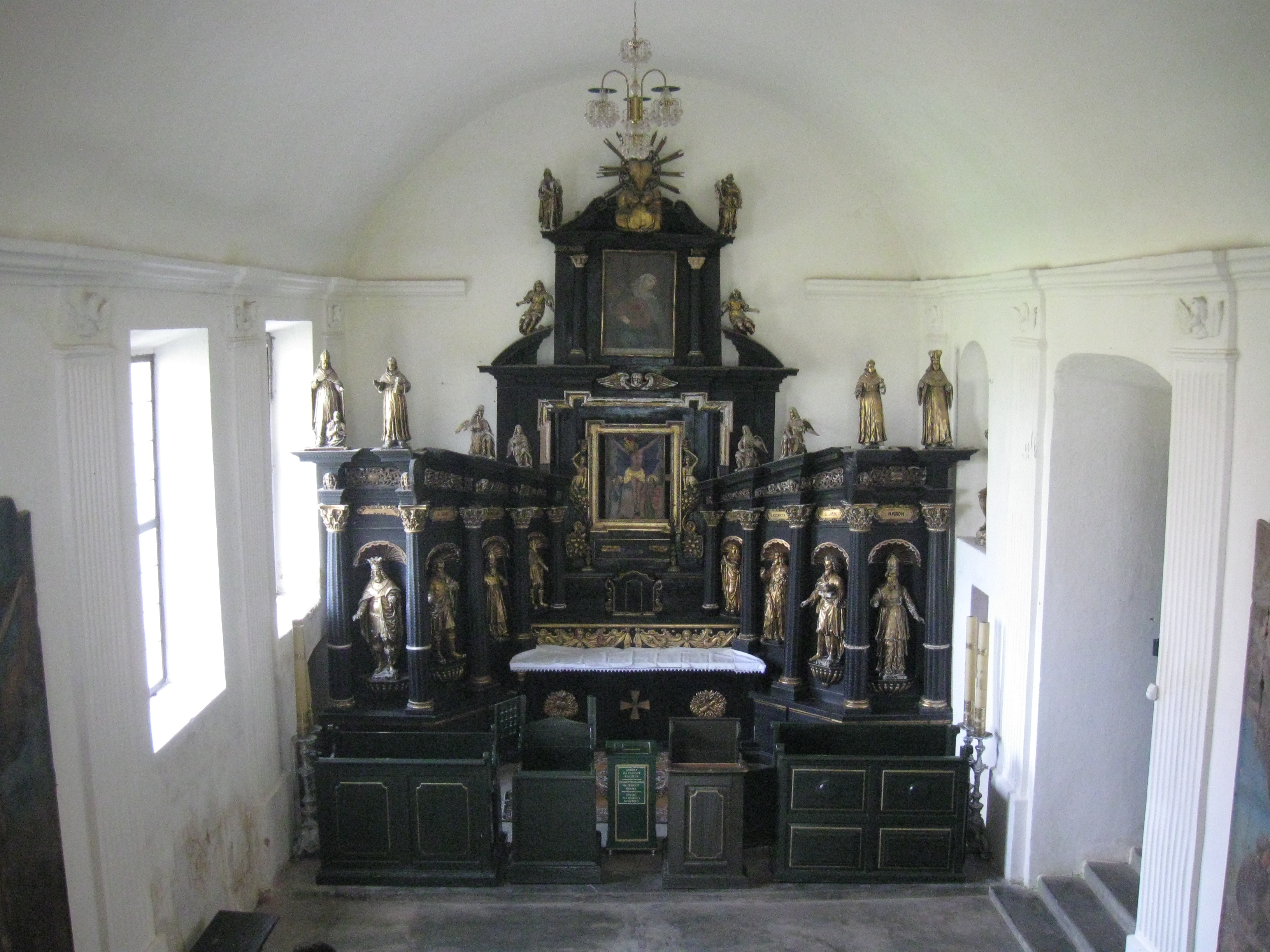 Беларуская (тарашкевіца): Комплекс былога кляштара бэрнардынцаў, дэкаратыўнае аздабленьне касьцёла: галоўны і бакавыя алтары росьпісы. в. Будслаў This is a photo of Belarusian heritage monument. Reference number: 611Г000422 ( WLM)